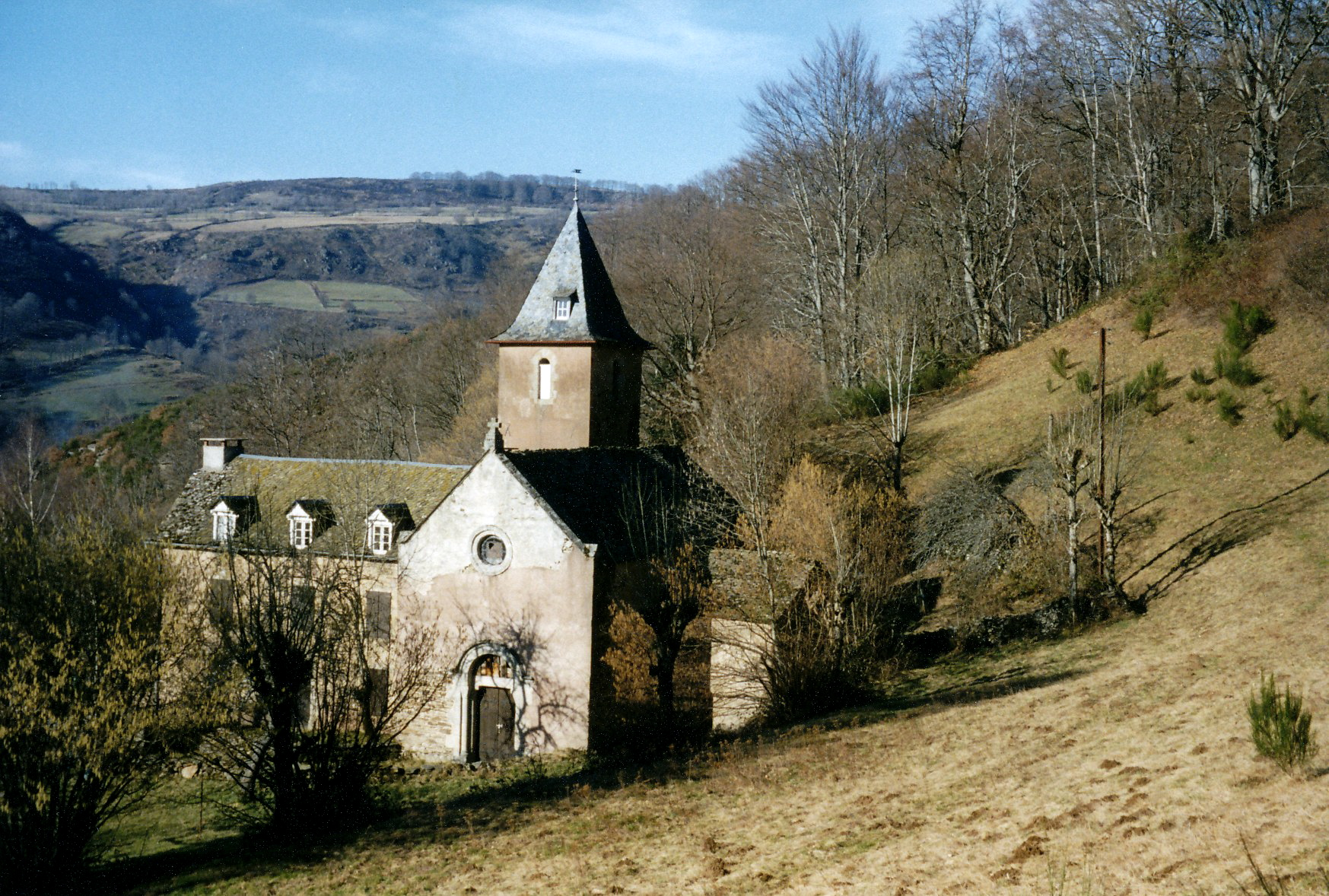 Eglise de la Fage. Pomayrols, Aveyron, France